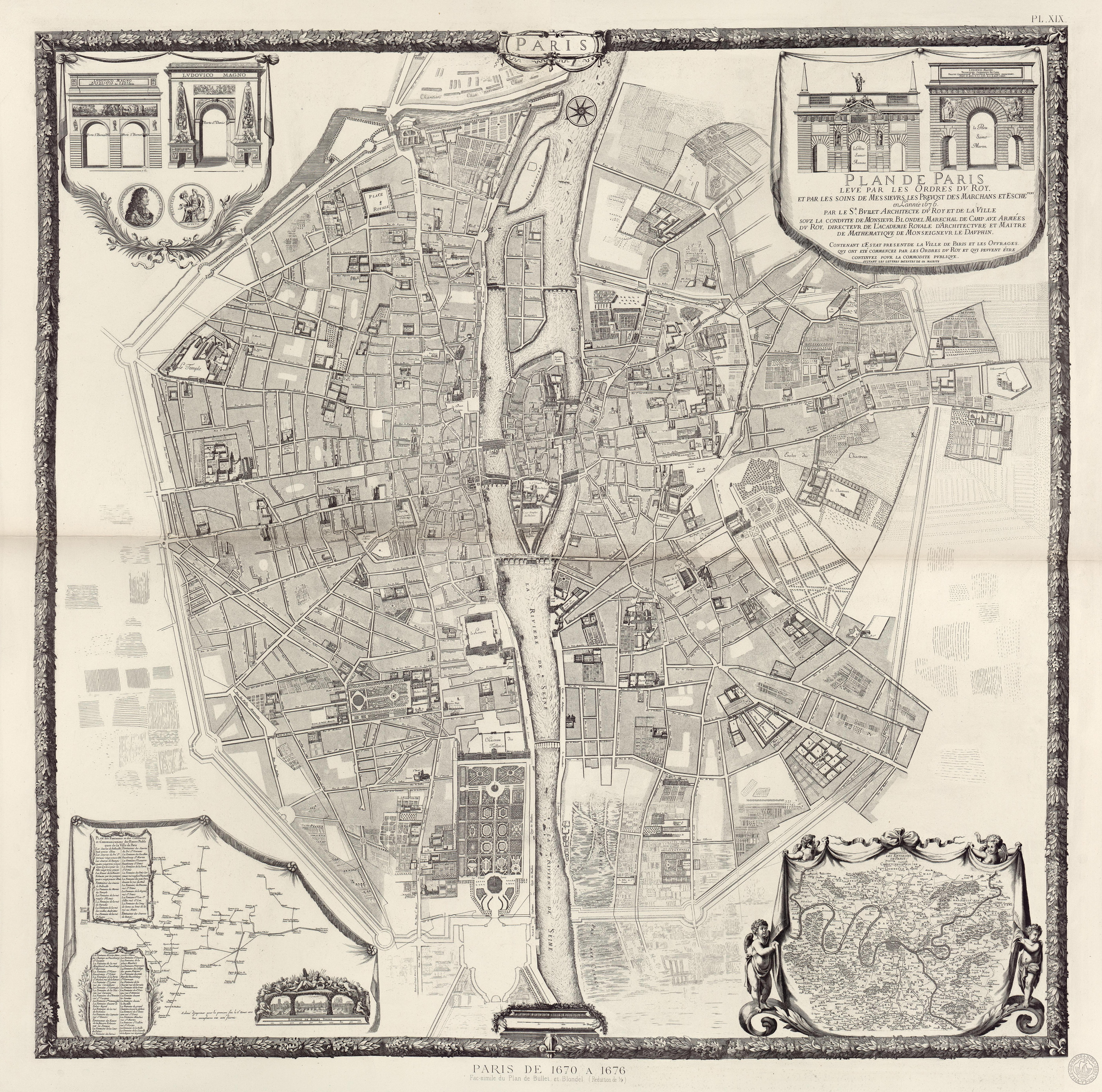 Atlas des anciens plans de Paris. Reproduction en fac-similé des originaux les plus rares et les plus intéressants pour l'histoire de la topographie parisienne... Héliogravure Dujardin.